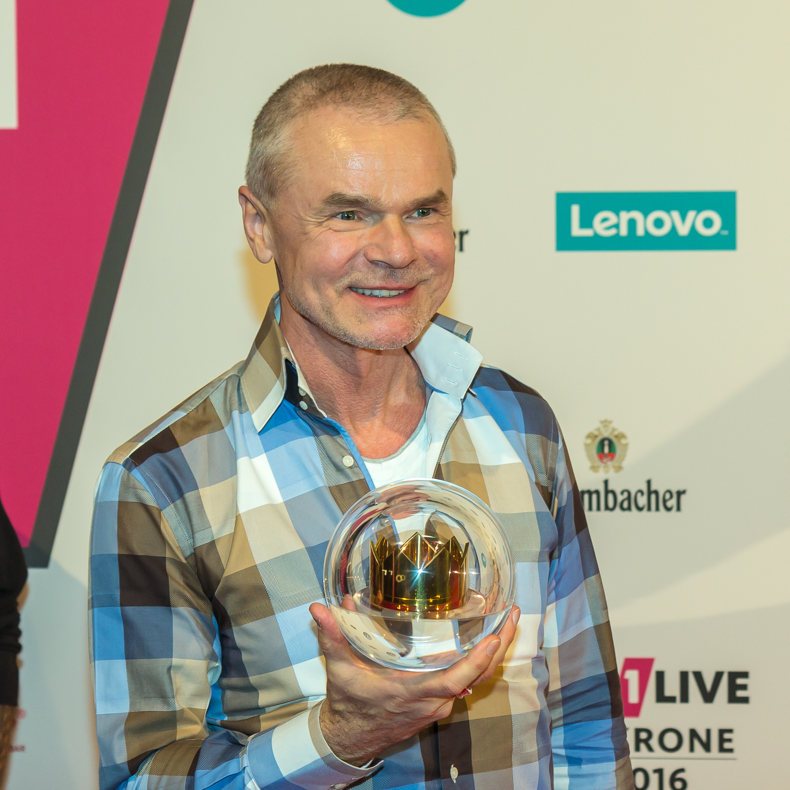 1LIVE Krone 2016 - Gewinner Jürgen Domian